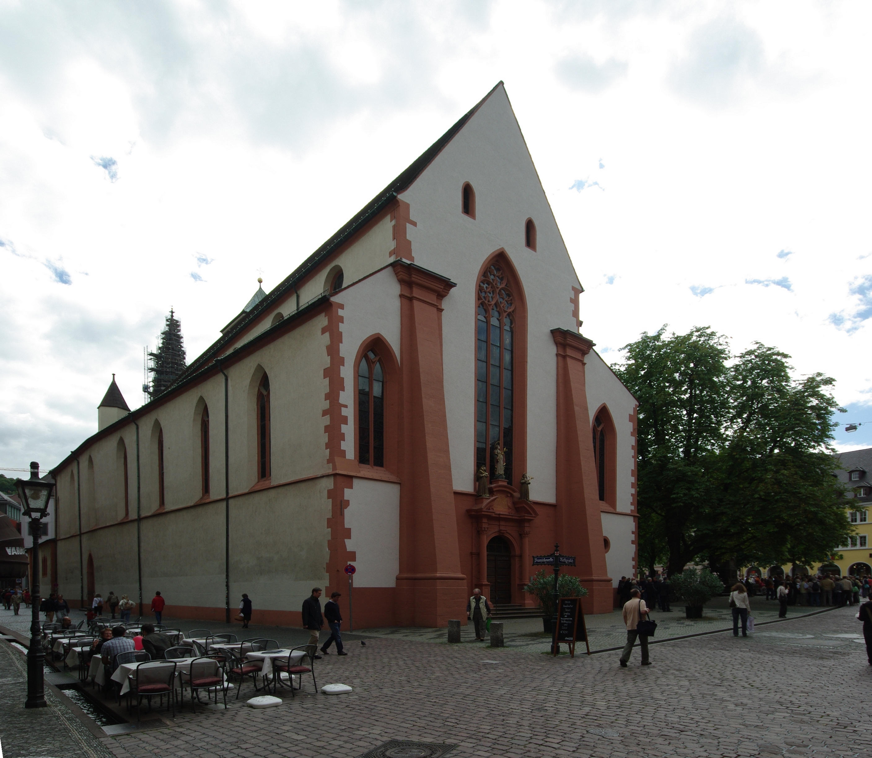 St. Martin Kirche inn der Innenstadt